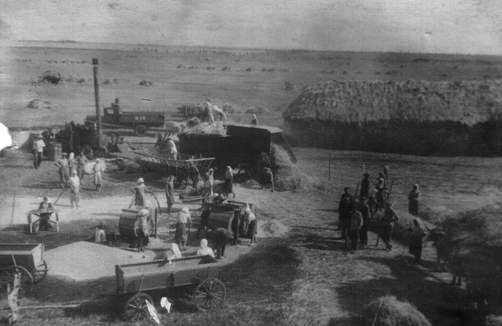 Робота на току 1947 рік